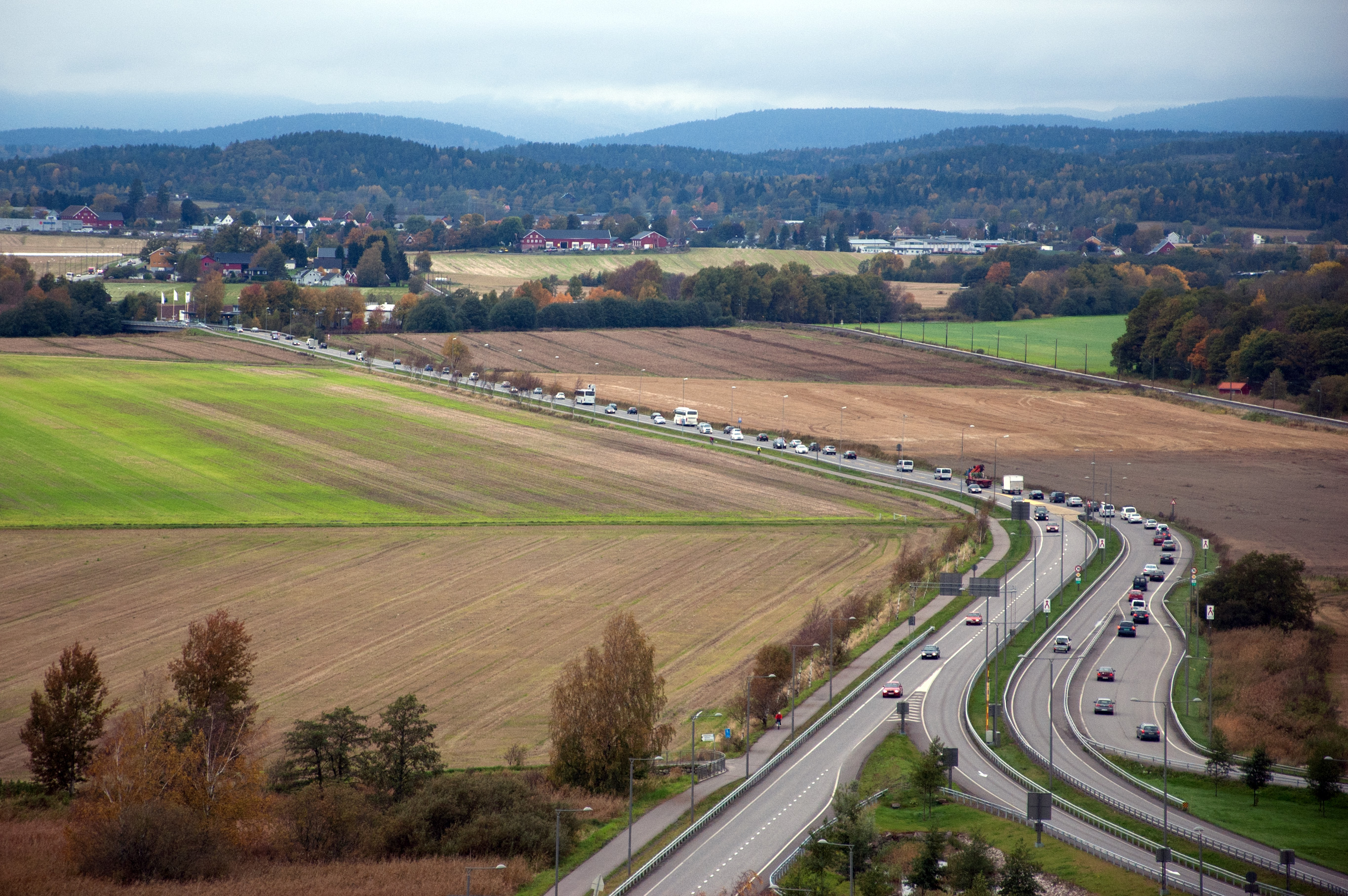 Fylkesvei 300 Semslinna og Vestfoldbanen, i Tønsberg, Vestfold.